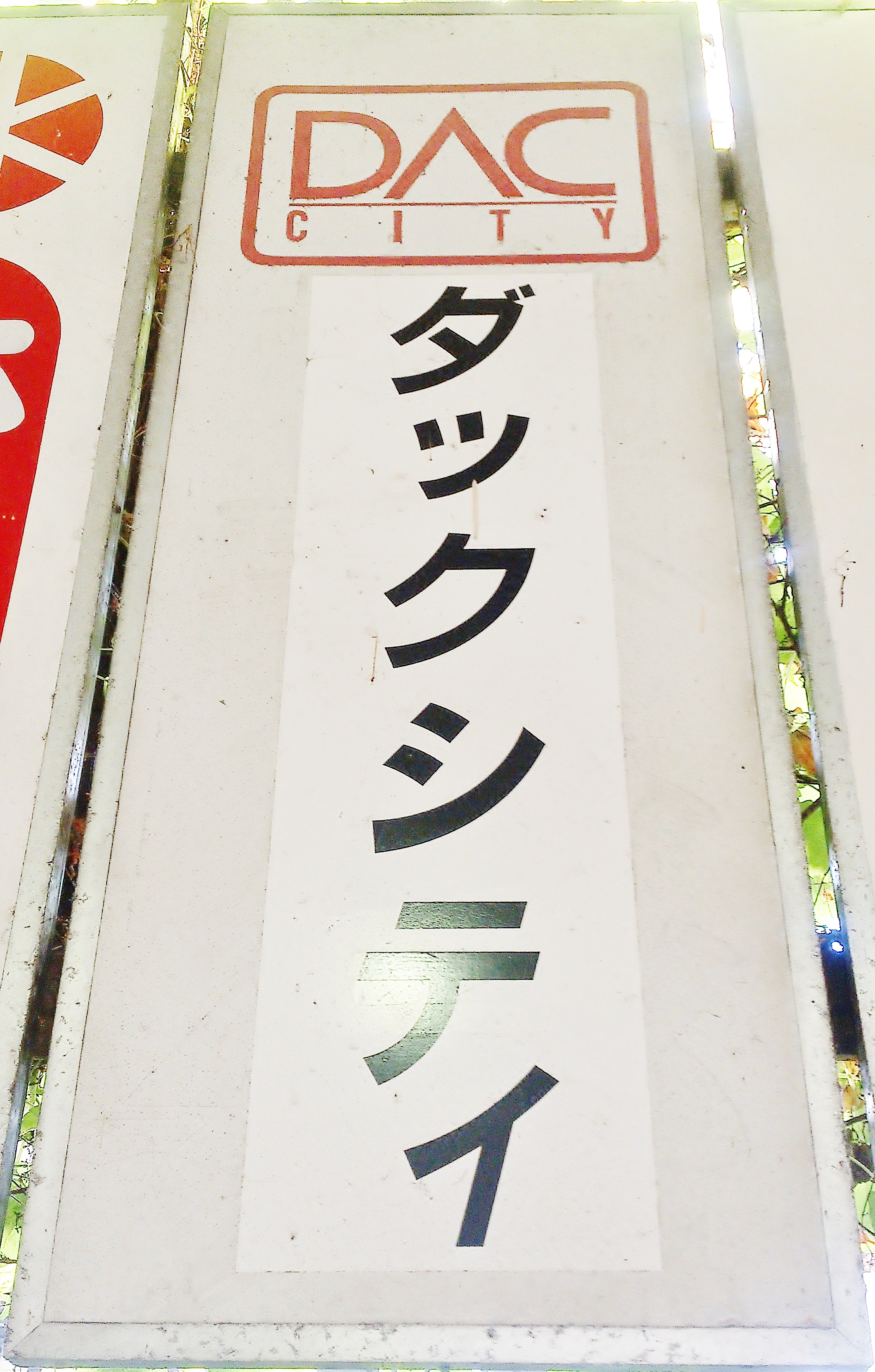 新潟県 長岡市 にて撮影